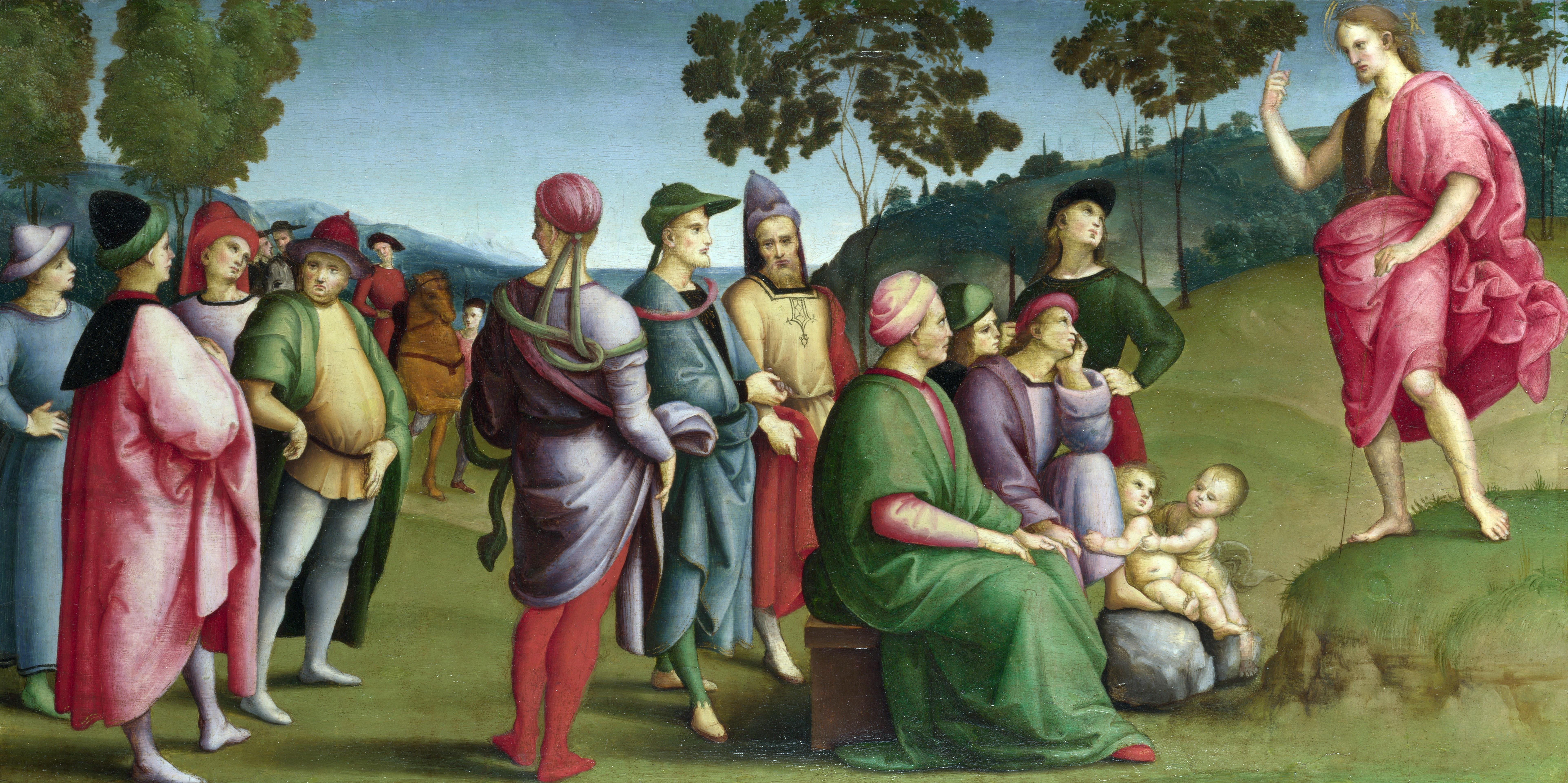 The Ansidei Altarpiece, San Fiorenzo, Perugia